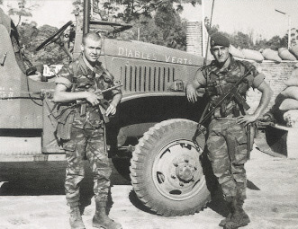 Deux légionnaires parachutistes armés de MAT 49 lors de la bataille de Kolwezi en 1978 devant un camion GMC.